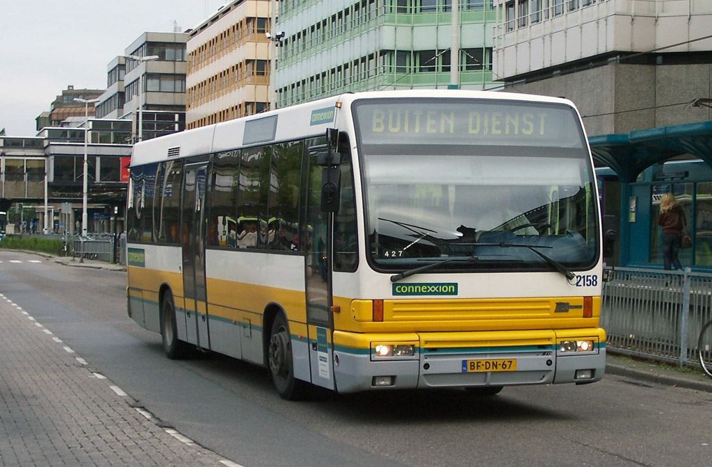 Een lijnbus van Connexxion op het streekbusstation van station Utrecht Centraal. De bus heeft de kleuren van rechtsvoorganger Midnet.